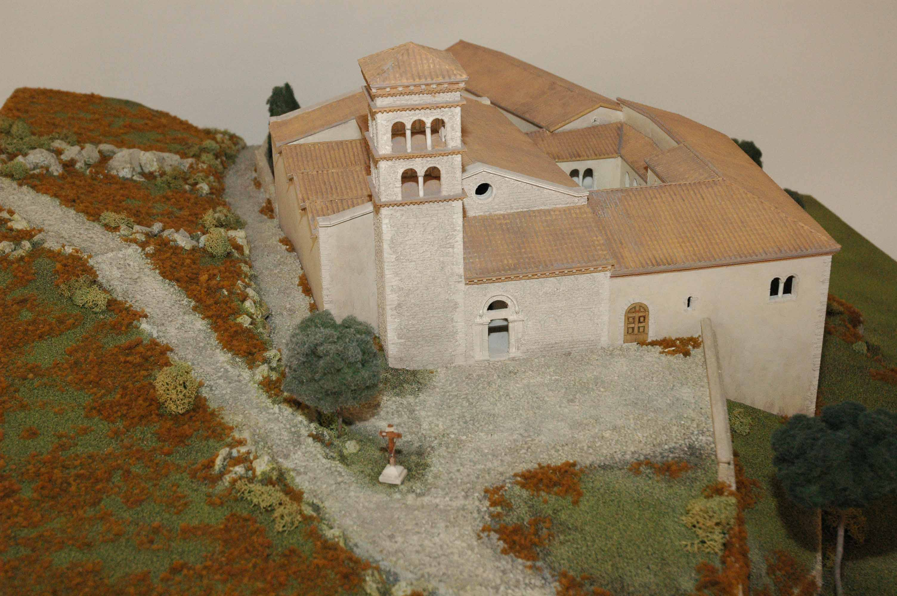 Plastico del monastero e della chiesa di San Giorgio a Riofreddo (RM), attualmente diruto.